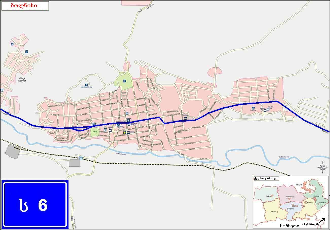 საქართველოს საავტომობილო მაგისტრალი ს6